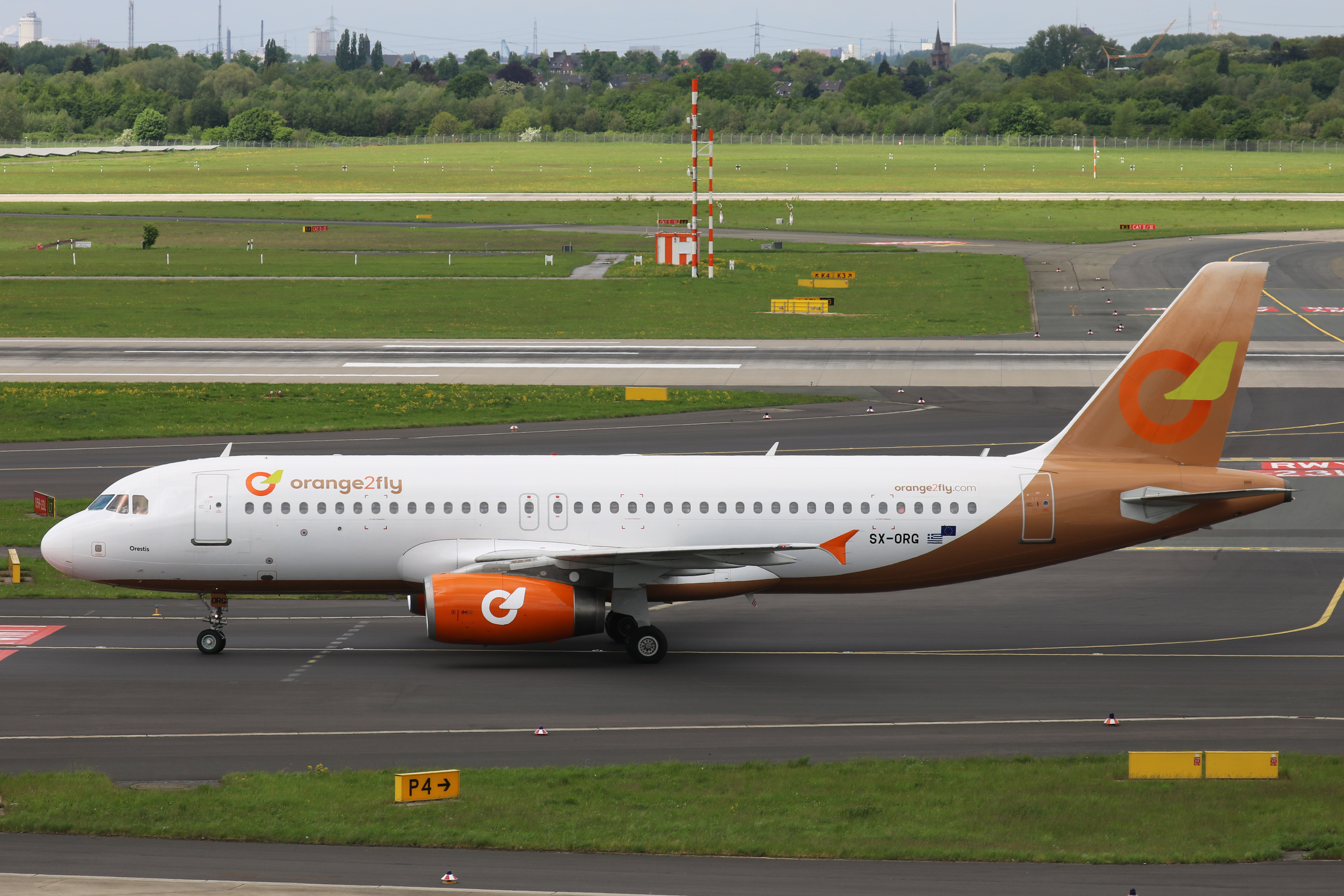 Flughafen Düsseldorf, Airbus A320-200 (SX-ORG) der Orange2Fly